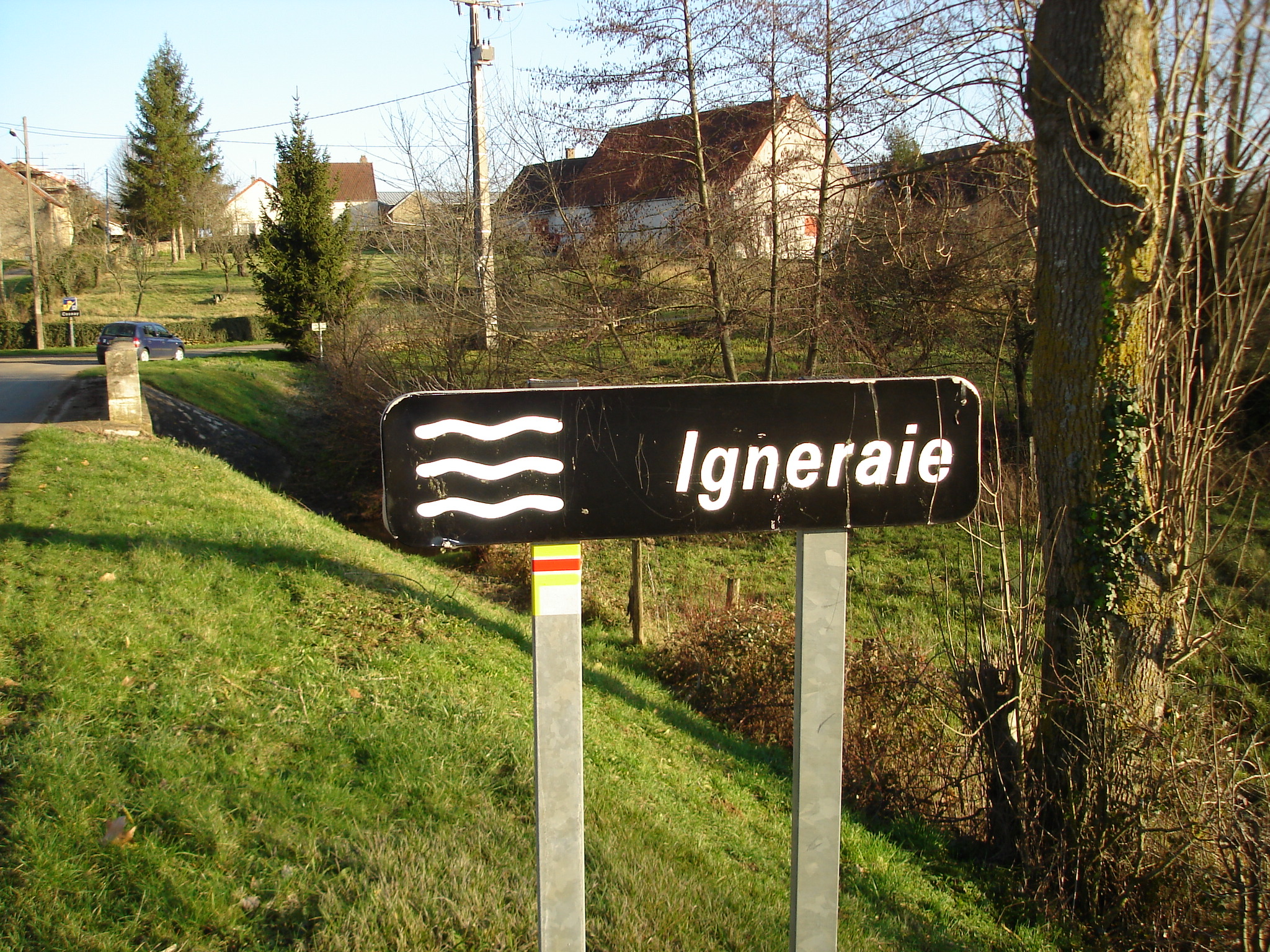 Le panneau (E32) de la rivière Igneraie, à Lacs (36).